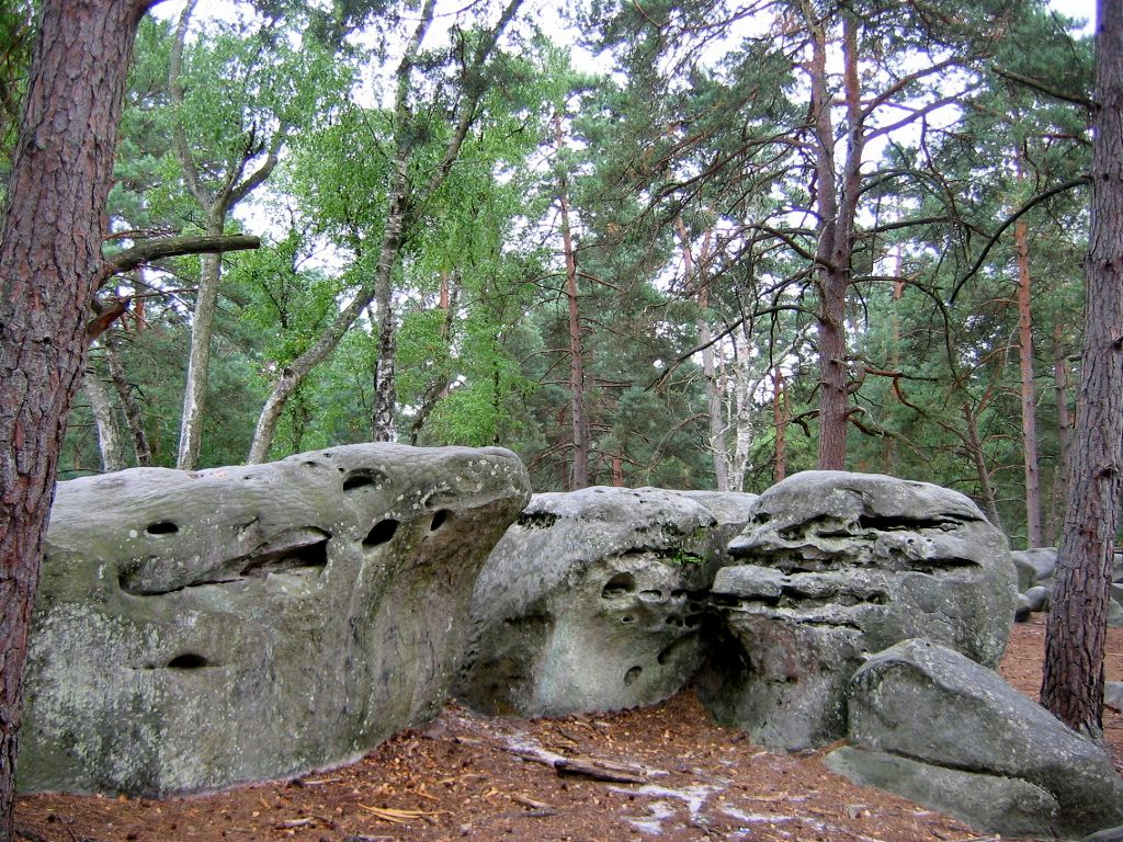 Forêt de Fontainebleau : gorges de Franchard